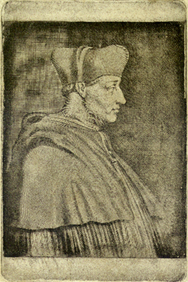 Georges d'Amboise, incisione, 19.5 x 13 cm